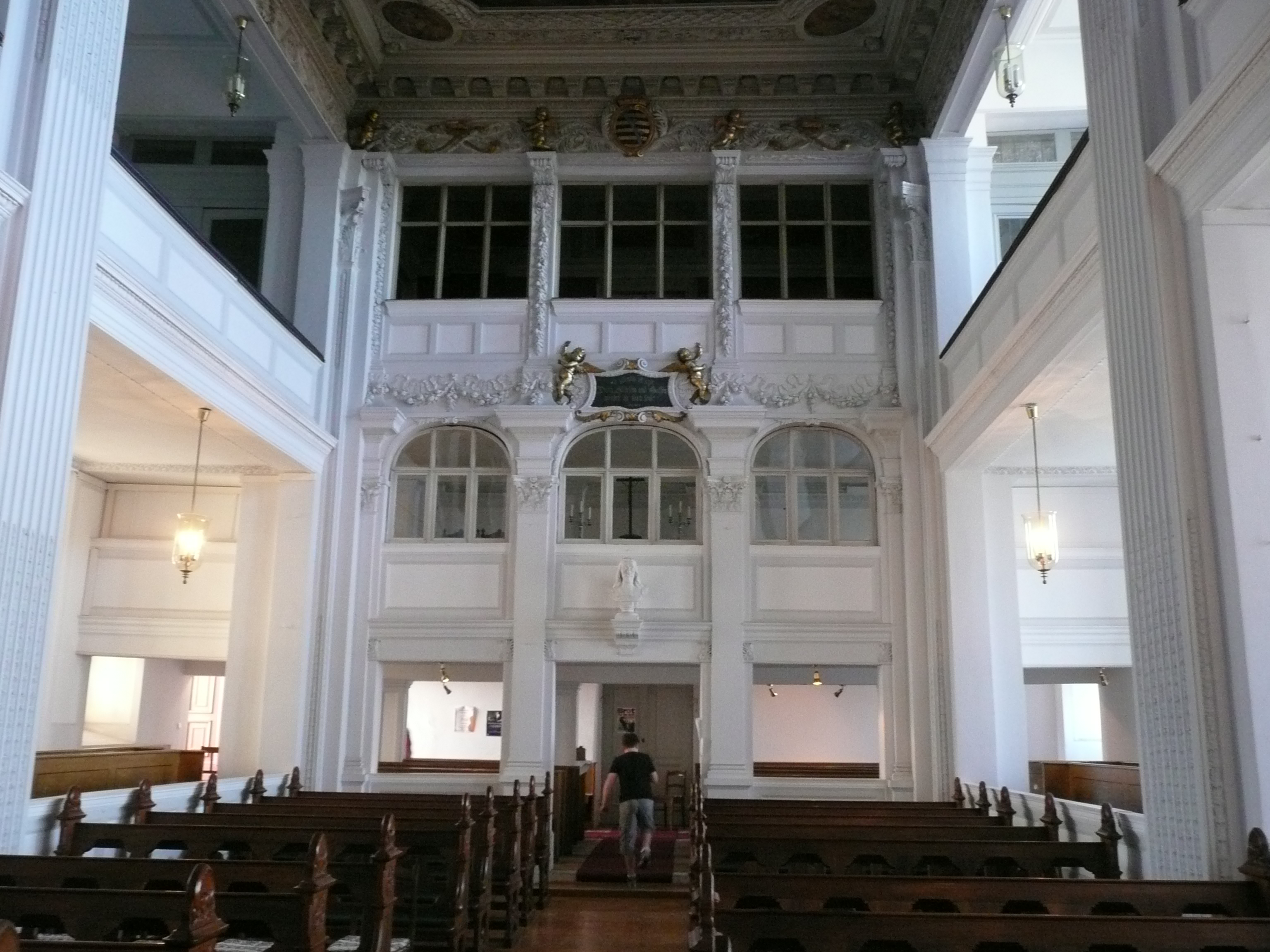 Blick auf die Fürstenloge gegenüber dem Altar